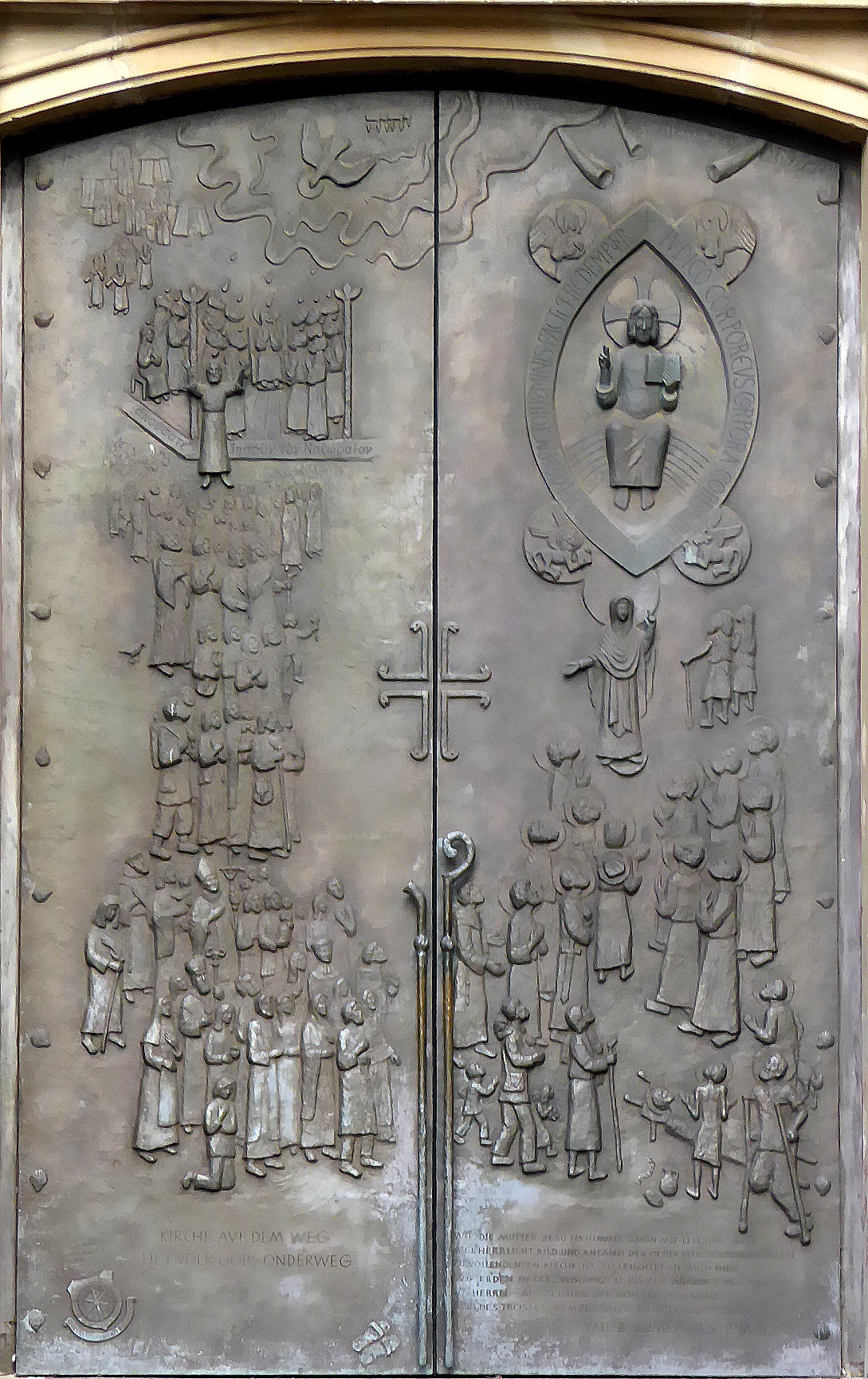 Marienbasilika Kevelaer : Das Hauptportal an der Westseite ist gestaltet von Willi Dirx. Eine zweiflügelige Bronzetür 4,40 m hoch und 2,70 m breit wurde 1980 eingefügt. " Kirche auf dem Weg" wird auf dem Relief bildlich dargestellt. Gesamtansicht der Tür mit Darstellungen aus der Bibel, projiziert in die Gegenwart.